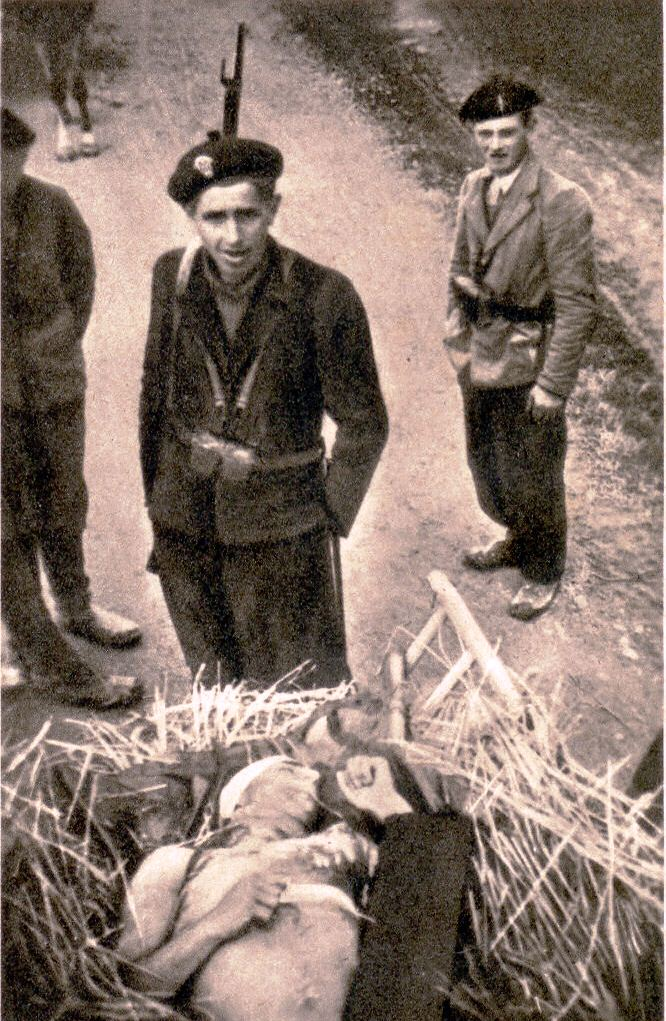 Pripadniki vaške straže